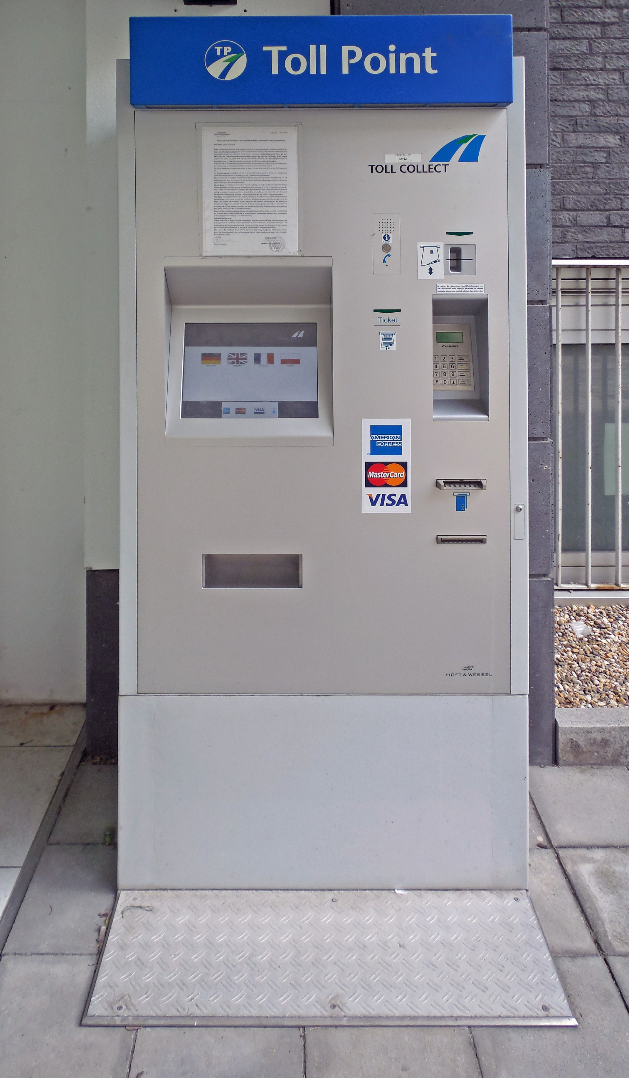 Toll Collect Maut Terminal vor dem BAG